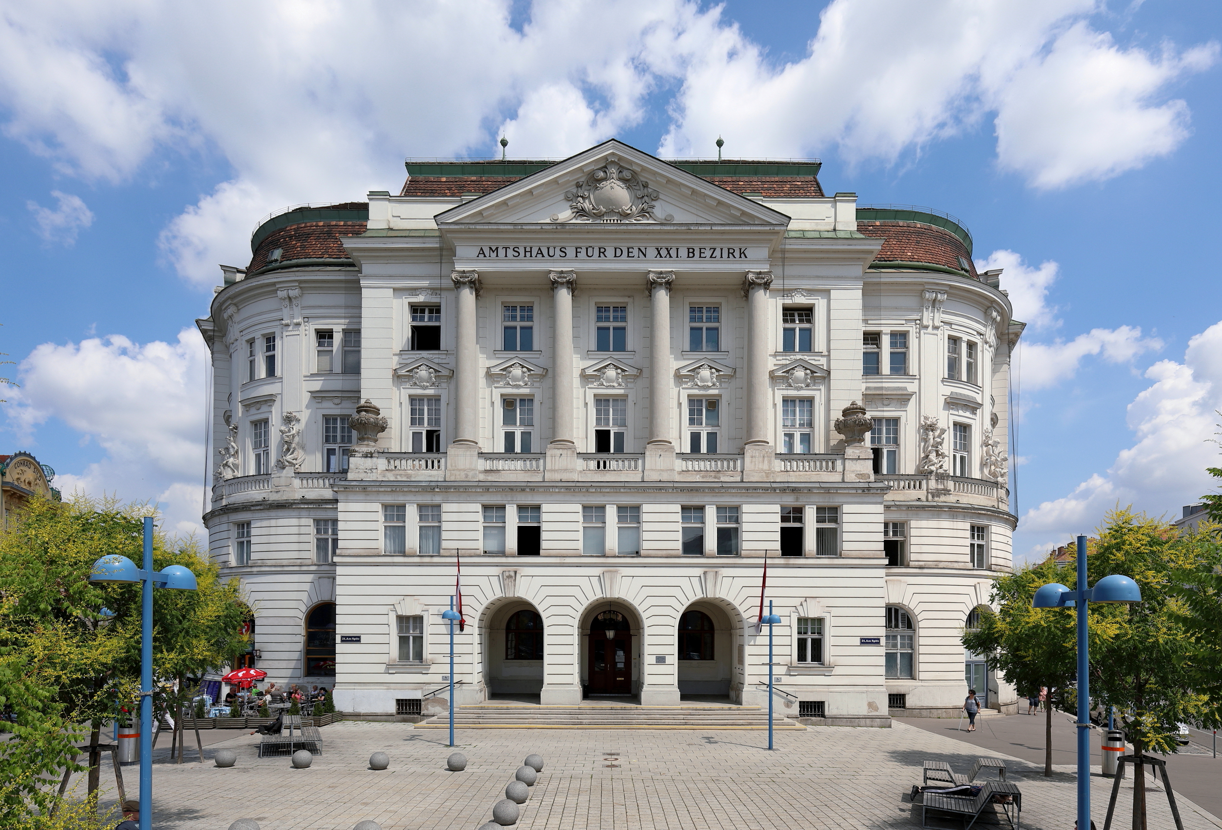 Das Amtshaus für den 21. Bezirk Floridsdorf in der österreichischen Bundeshauptstadt Wien. Das Gebäude in barockklassizistischen Formen wurde von 1901 bis 1903 – noch als Rathaus der Gemeinde Floridsdorf – nach Plänen von Anton und Josef Drexler errichtet.